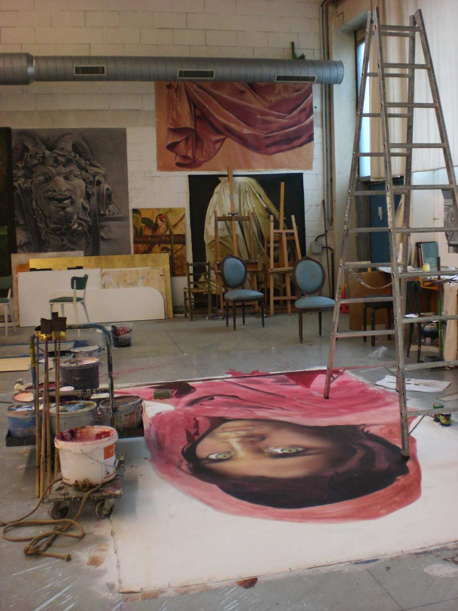 Ecke des Malersaals in den Werkstätten der Bayerischen Staatsoper München.